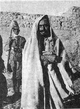 Carmine Iorio dopo l'arresto nel 1928